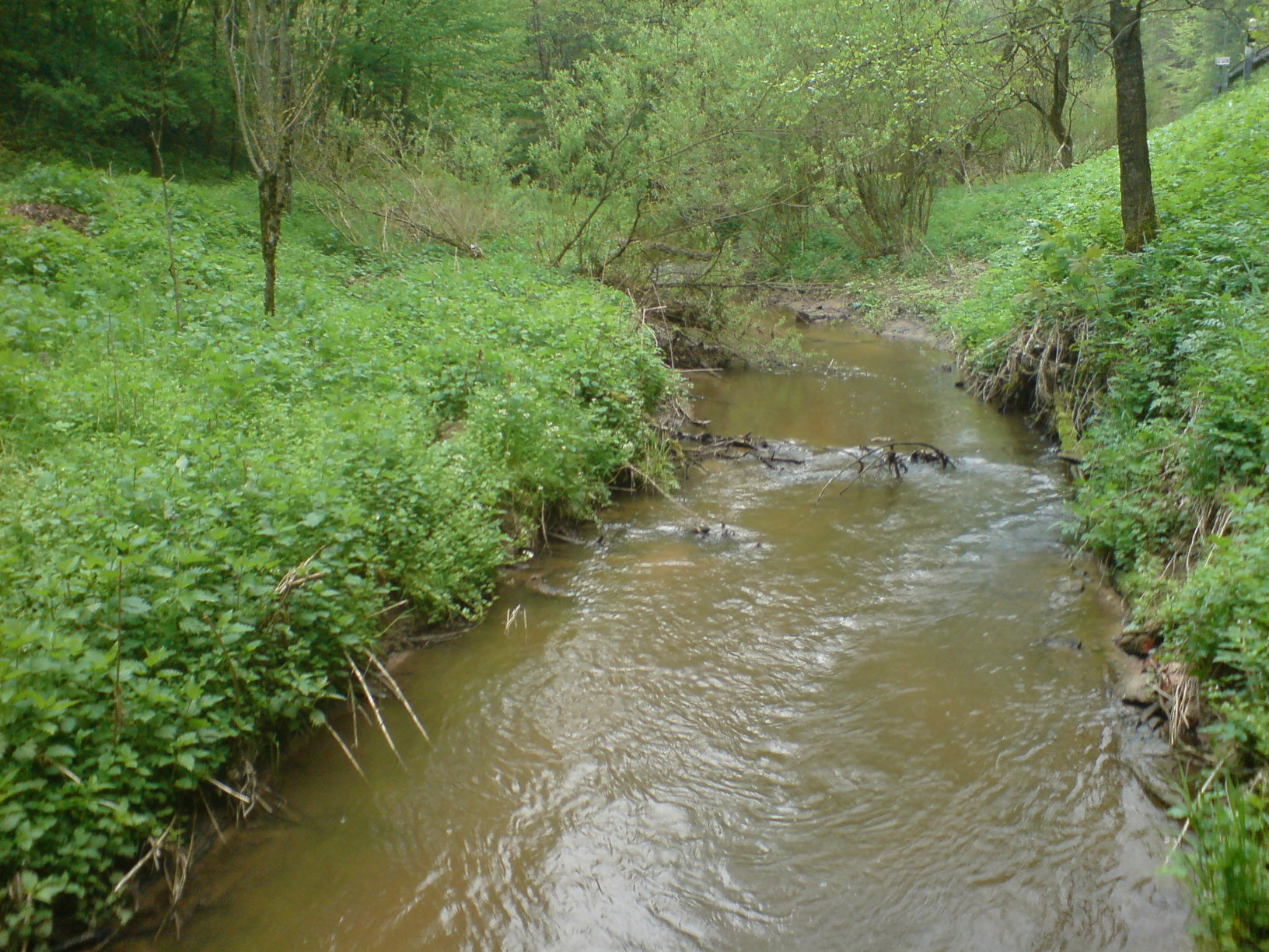 Rechenberger Rot bei Jagstzell-Schweighausen